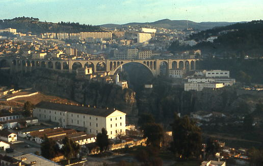 Constantine (Algérie), 1972